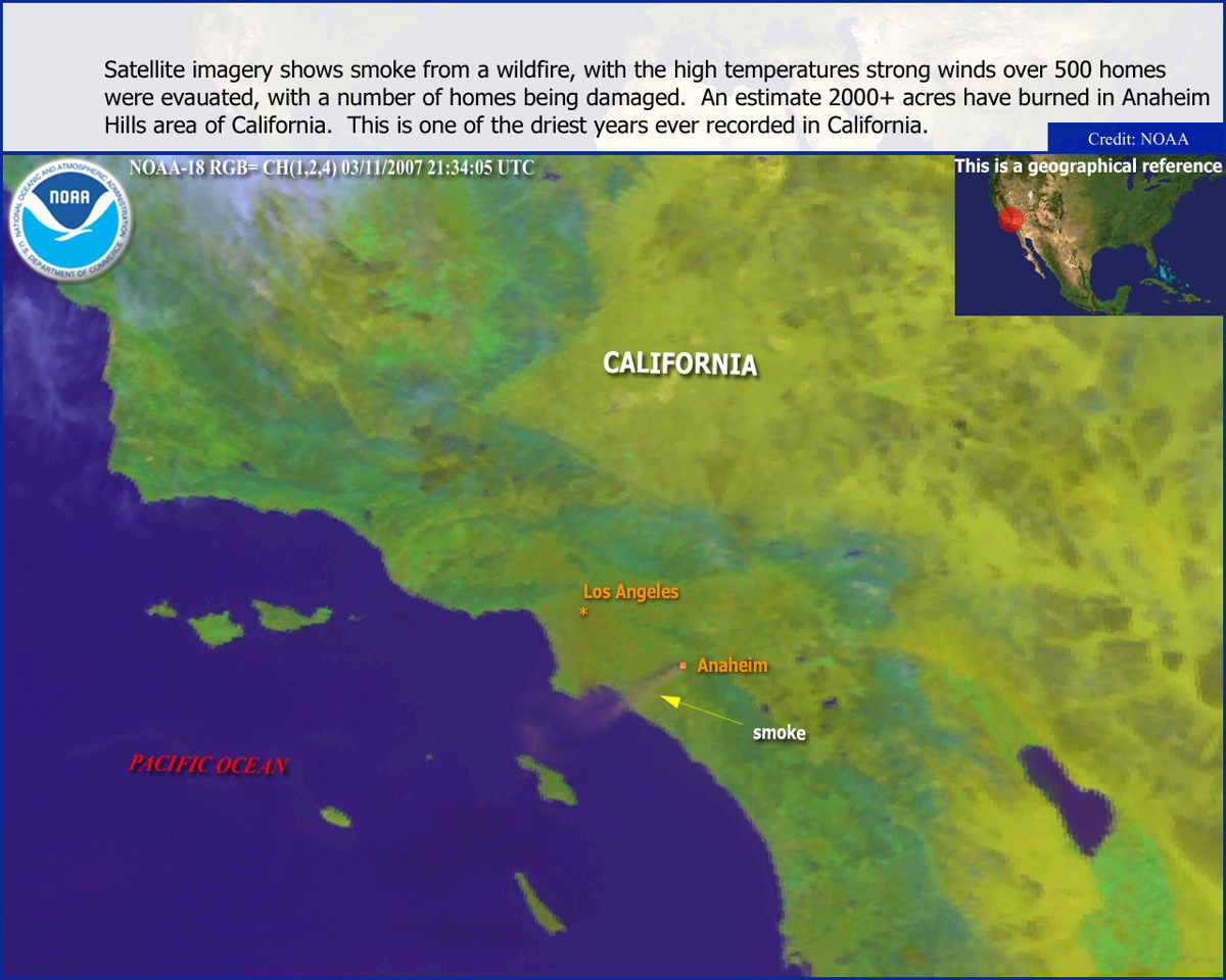 Visione dallo spazio del vasto incendio ad Anaheim (calif) nell'Orange County.